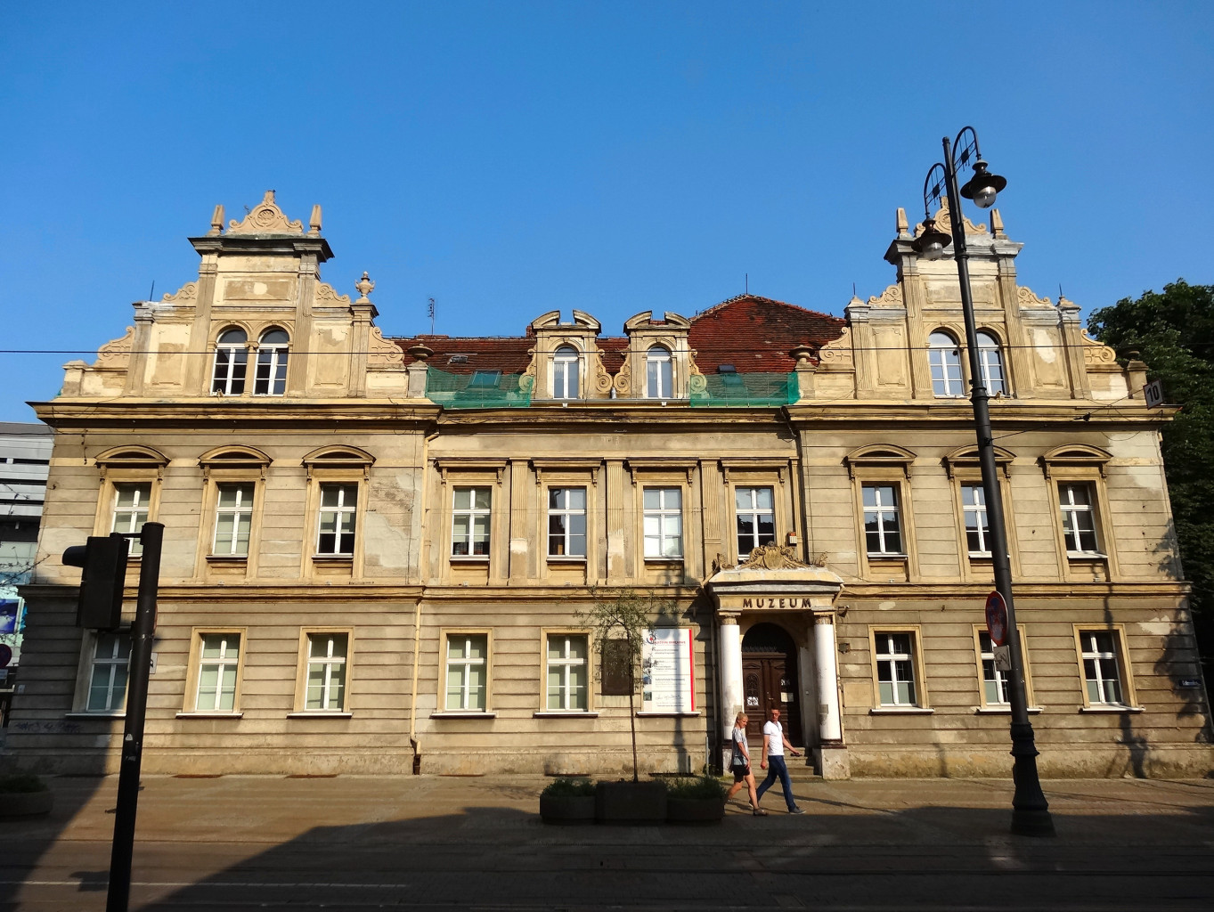 Budynek Gdańska 4 - dawny klasztor klarysek, od XIX w. Lecznica Miejska; od 1945 r. siedziba Muzeum Okręgowego